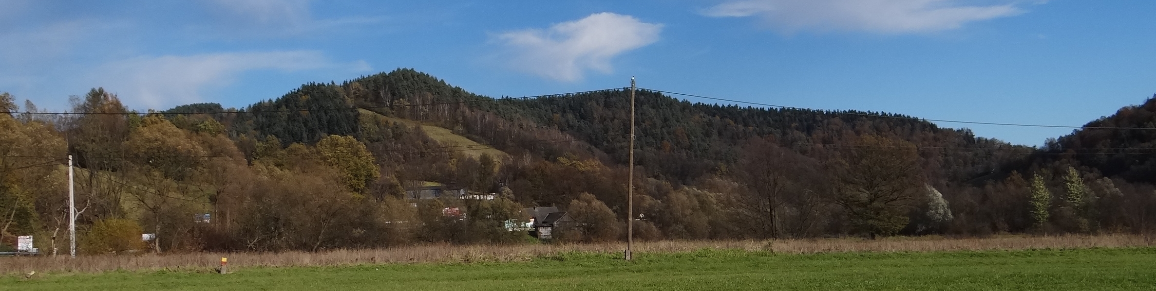 Laskowa Góra, widok z Młynnego